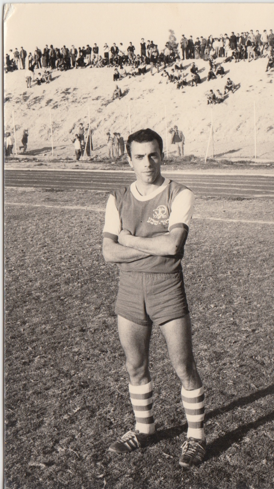 יצחק גוזלן בתקופת הכדורגל בקבוצת 'הפועל באר-שבע'